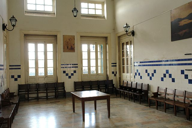 Viana do Castelo Train station